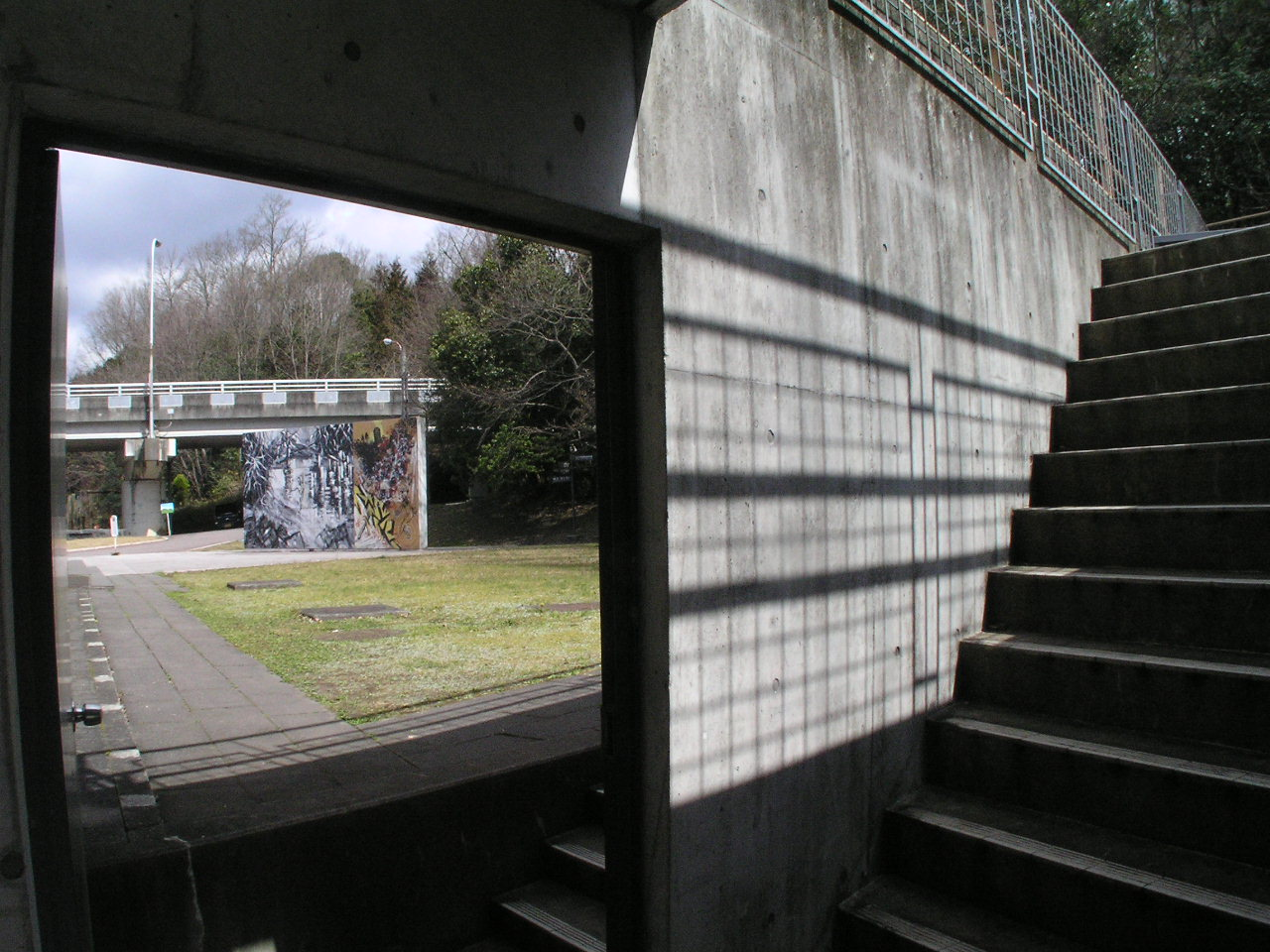 岡之山美術館 ～photo by Autumn Snake 【おぉたむ すねィく探検隊】